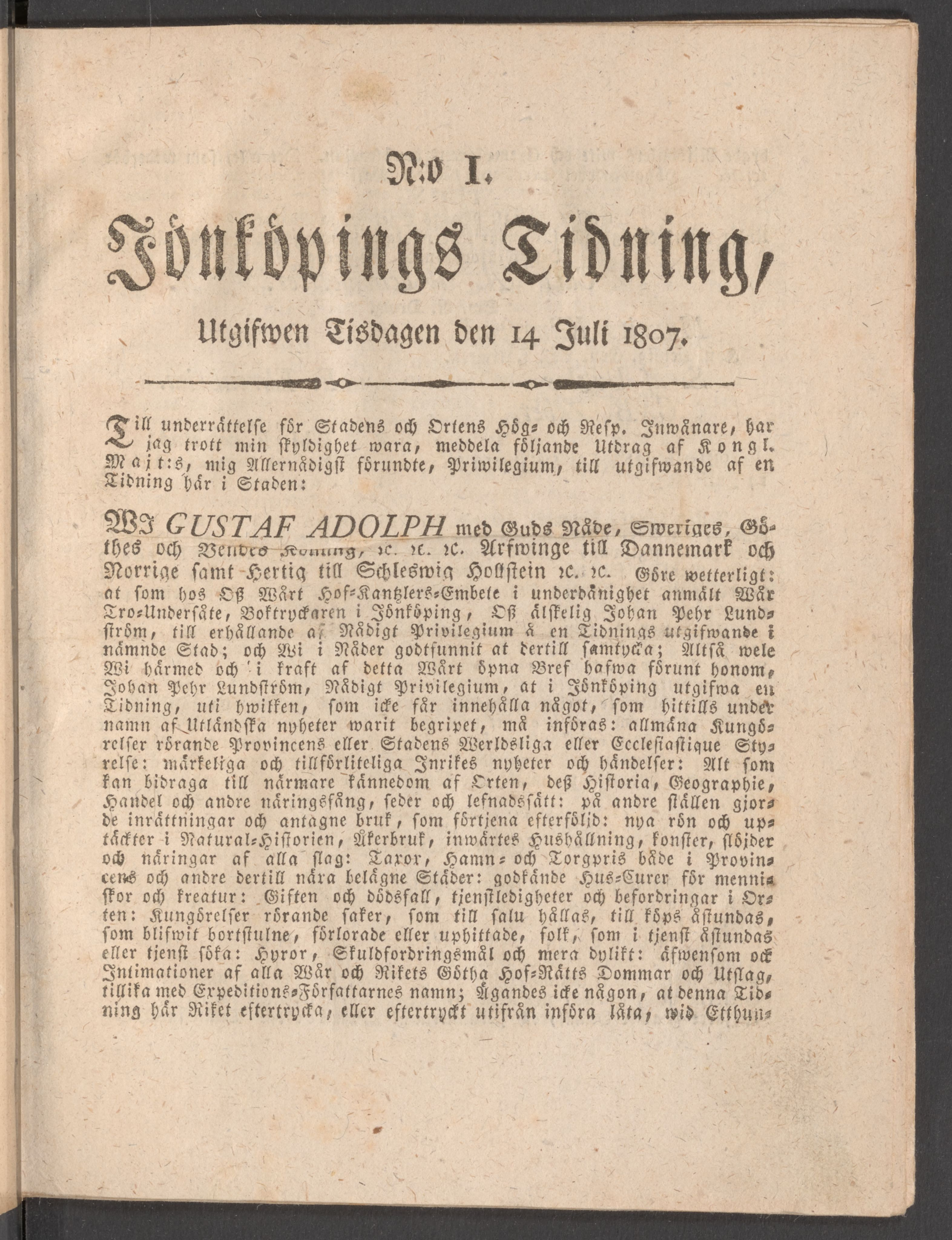 Jönköpings Tidning 1807-07-14, tidningens första nummer.